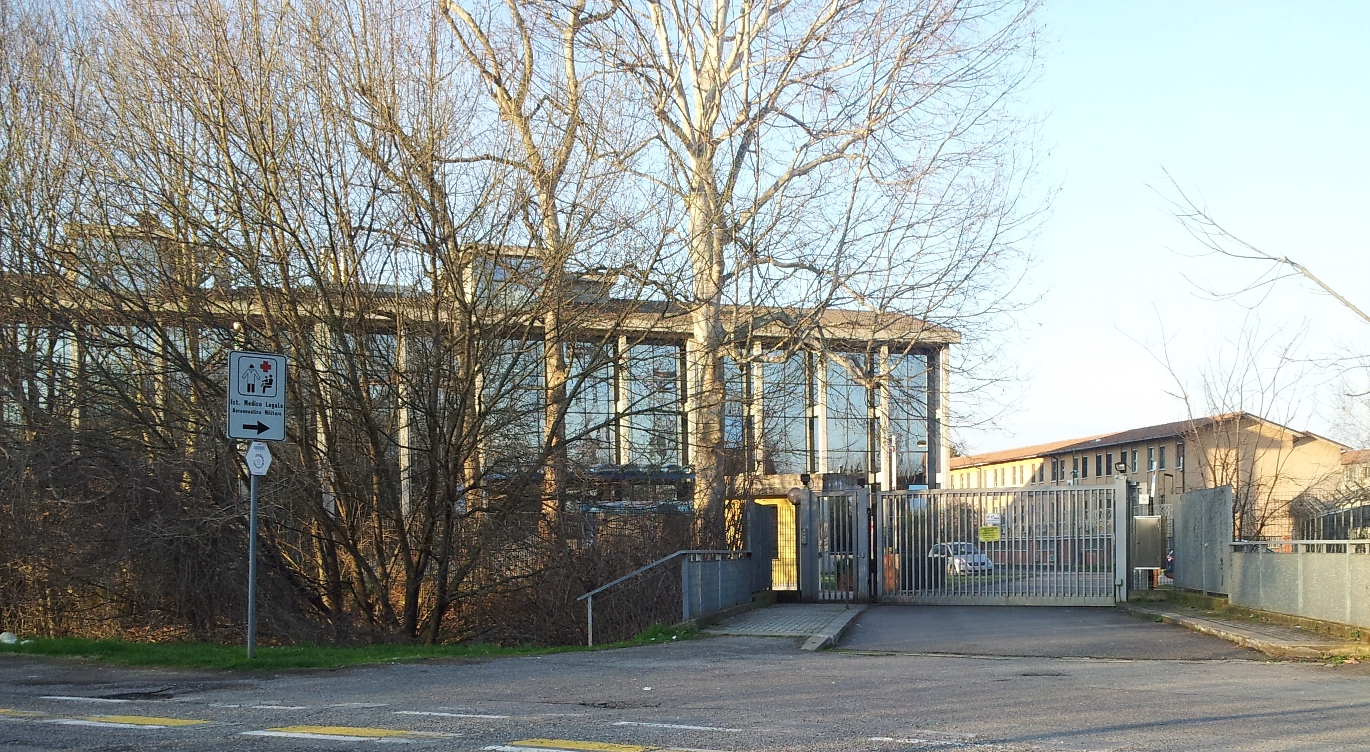 Entrata dell'Istituto Medico-Legale dell'Aeronautica Militare "Angelo Mosso", viale Aviazione, Milano.